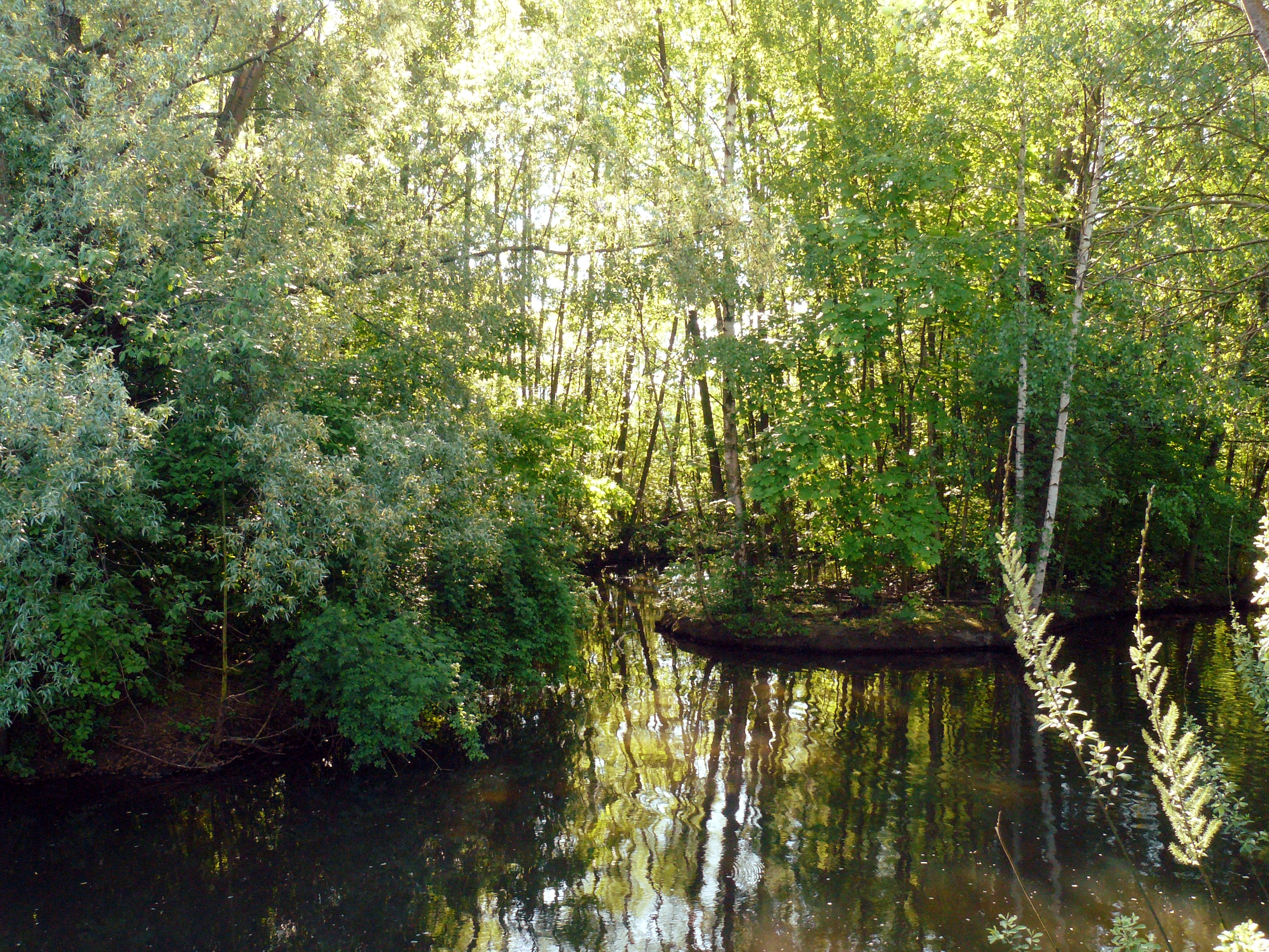 Goldbach kurz vor der Mündung in die Pegnitz 49°27′06″N 11°05′12″E / 49.451722°N 11.086594°E